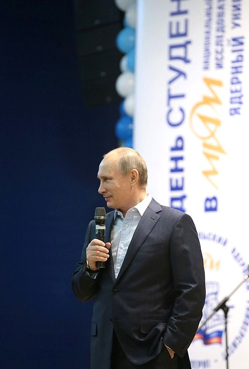 В ходе посещения Национального исследовательского ядерного университета «МИФИ» Владимир Путин ответил на вопросы студентов.